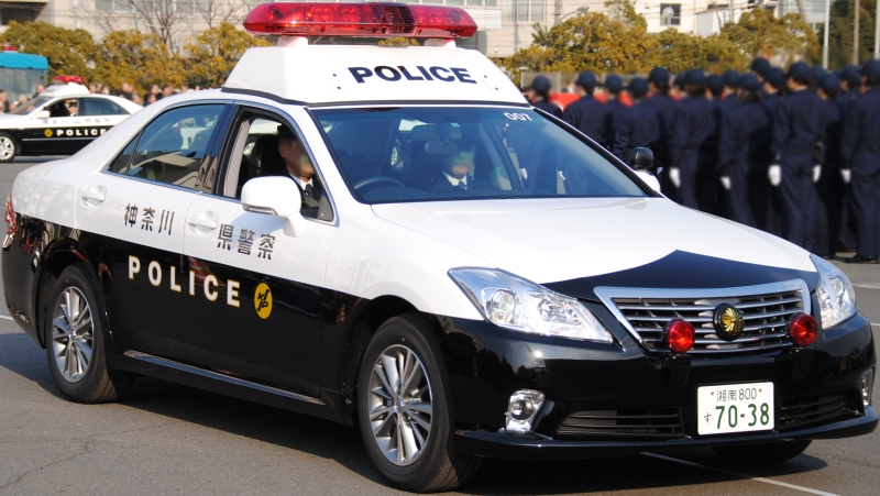 神奈川県警の200系クラウンパトカー